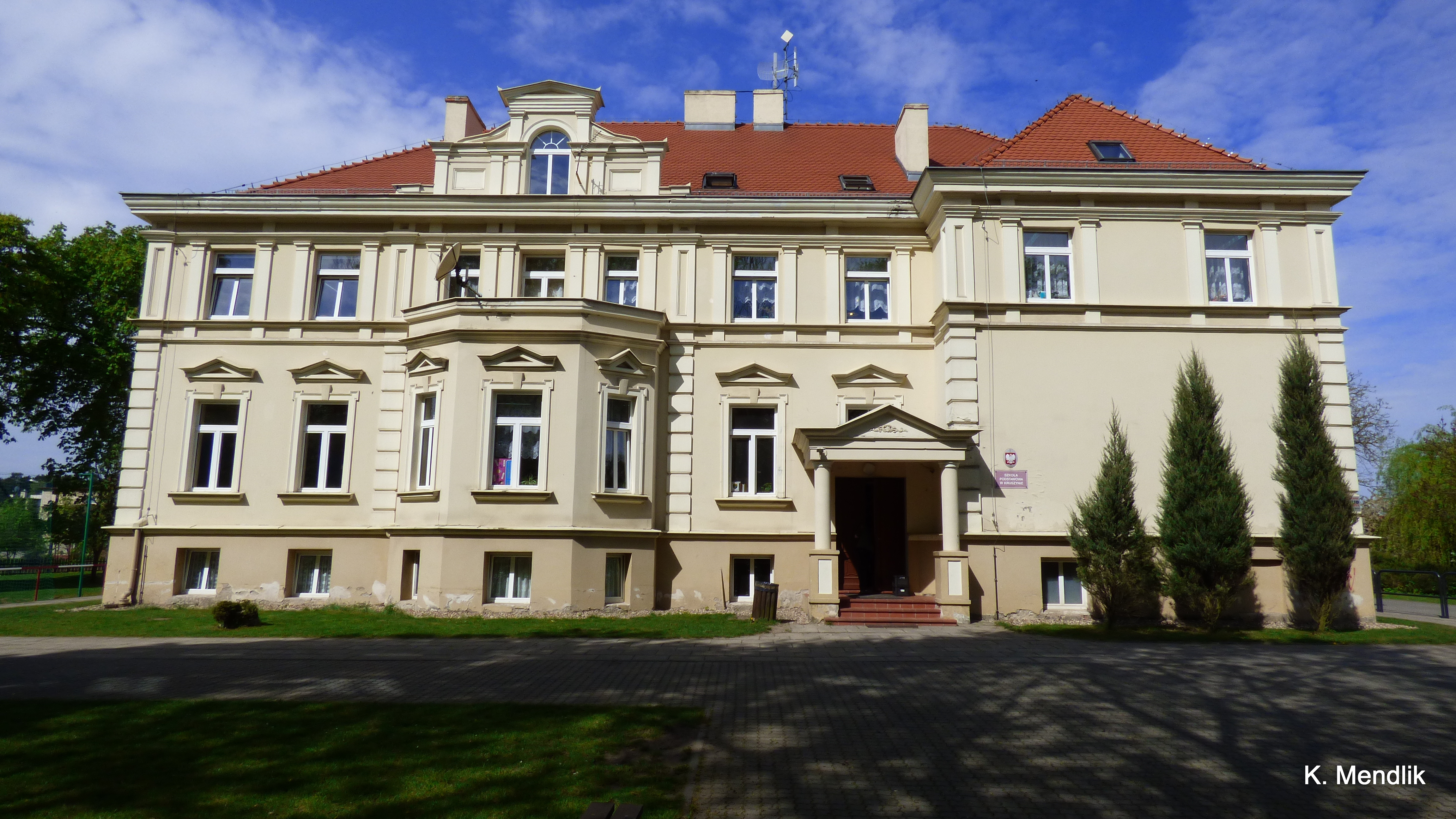 Szkoła Podstawowa im. Kardynała Stefana Wyszyńskiego w Kruszynie Kruszyn, ul. Szkolna 6